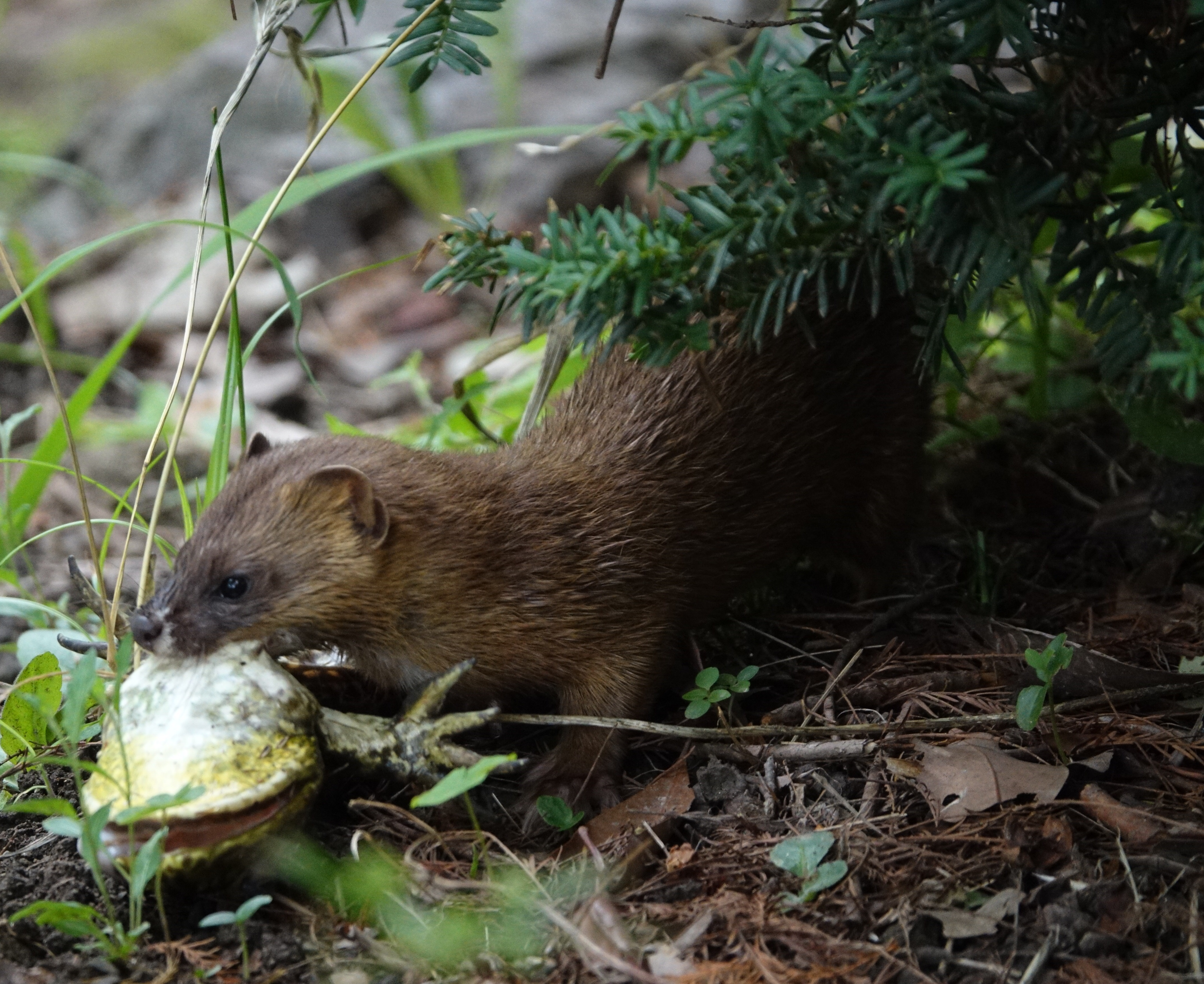 イタチによるウシガエルの捕獲